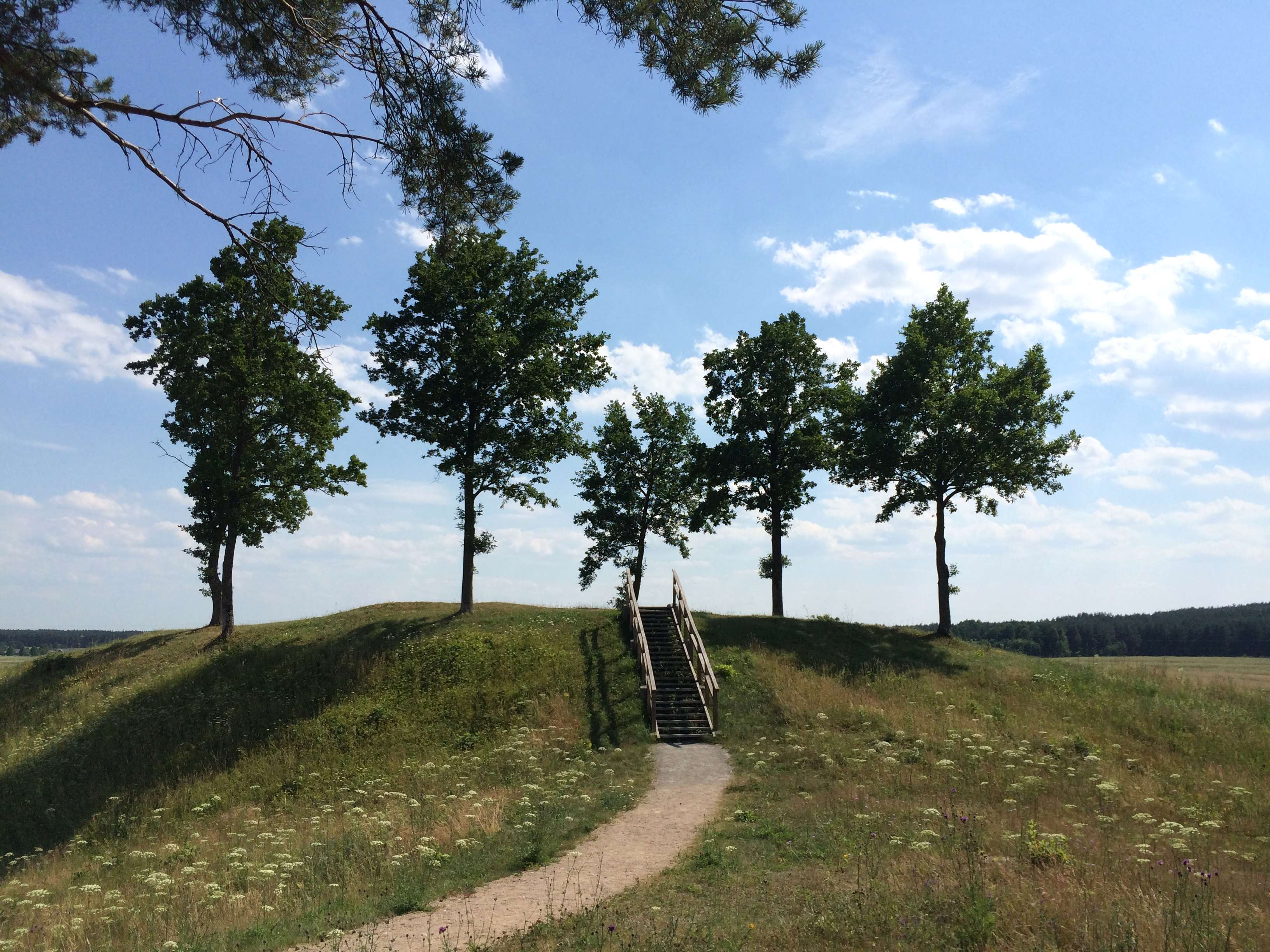 Bėčionių piliakalnis